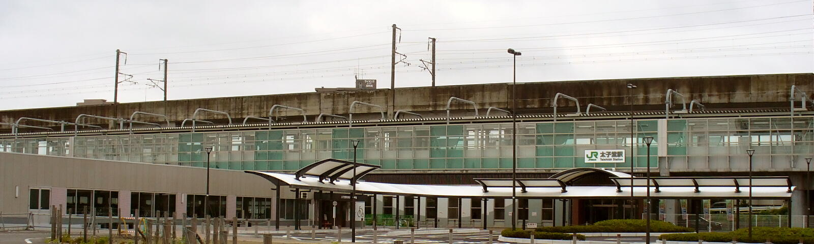 太子堂駅